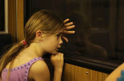 Untergrund